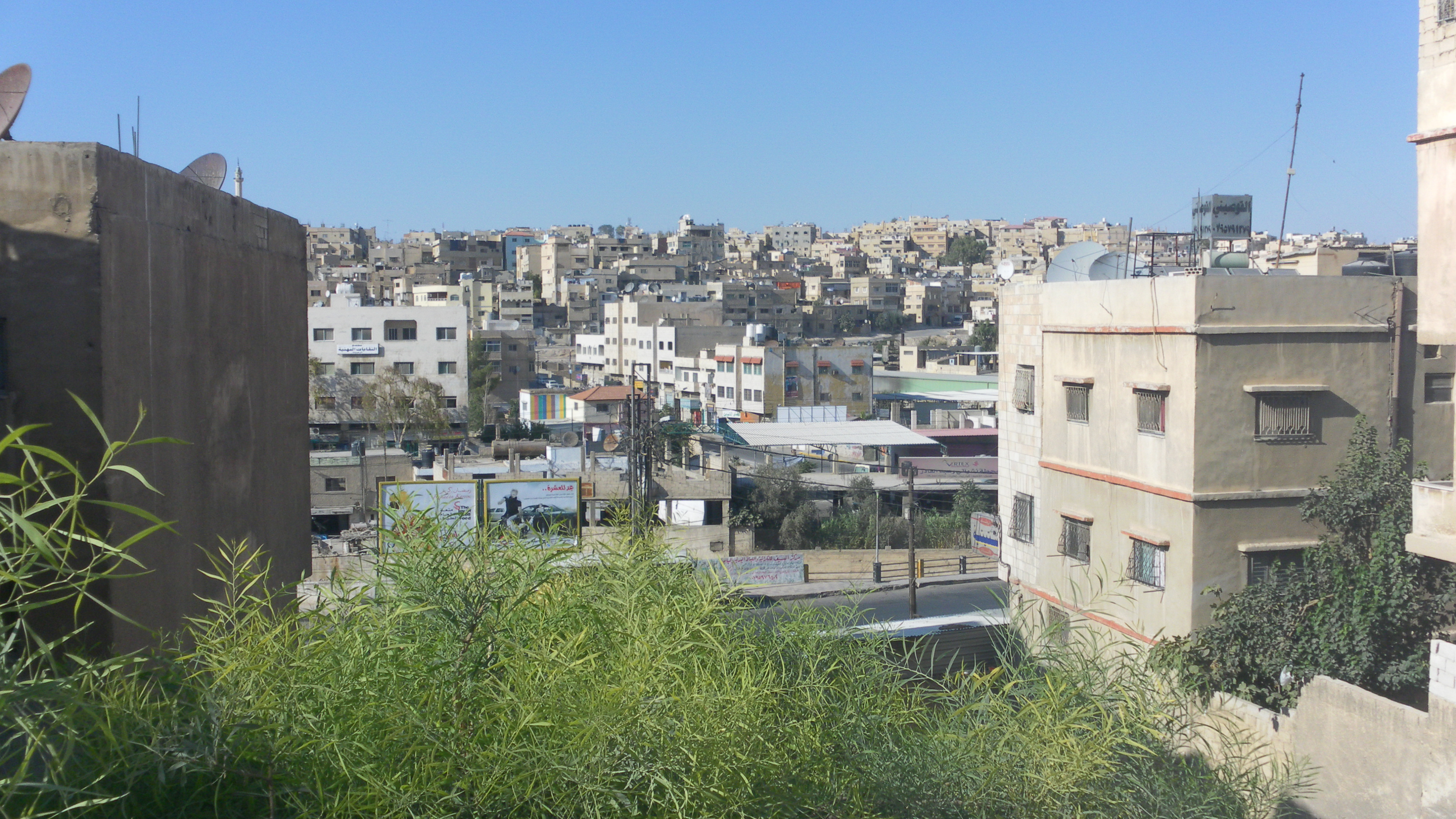 منطقة العامرية في مدينة الرصيفة، مشهد من الجبل الجنوبي باتجاه الجبل الشمالي. الرصيفة، الأردن